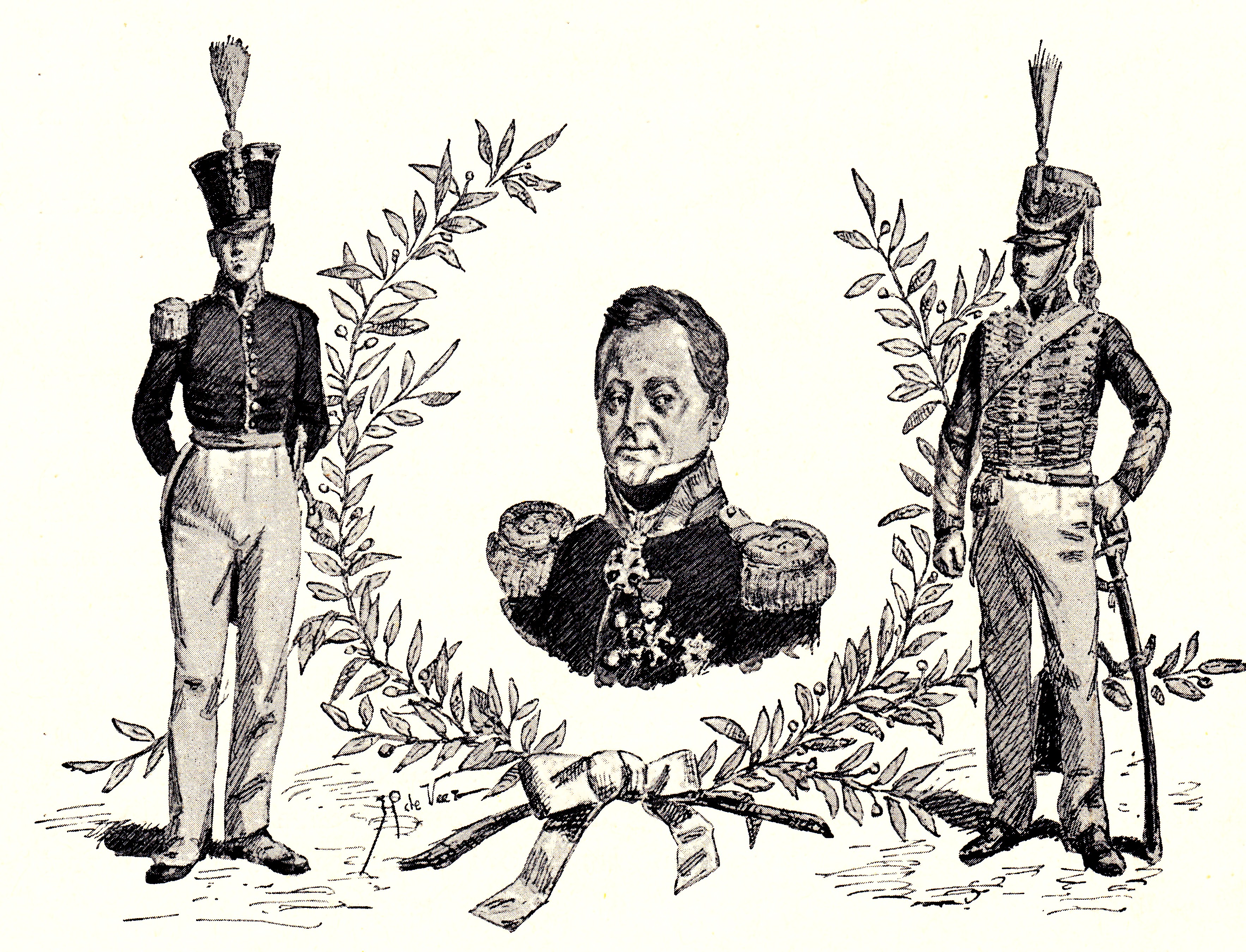 Generaal JJ. Baron van Geen